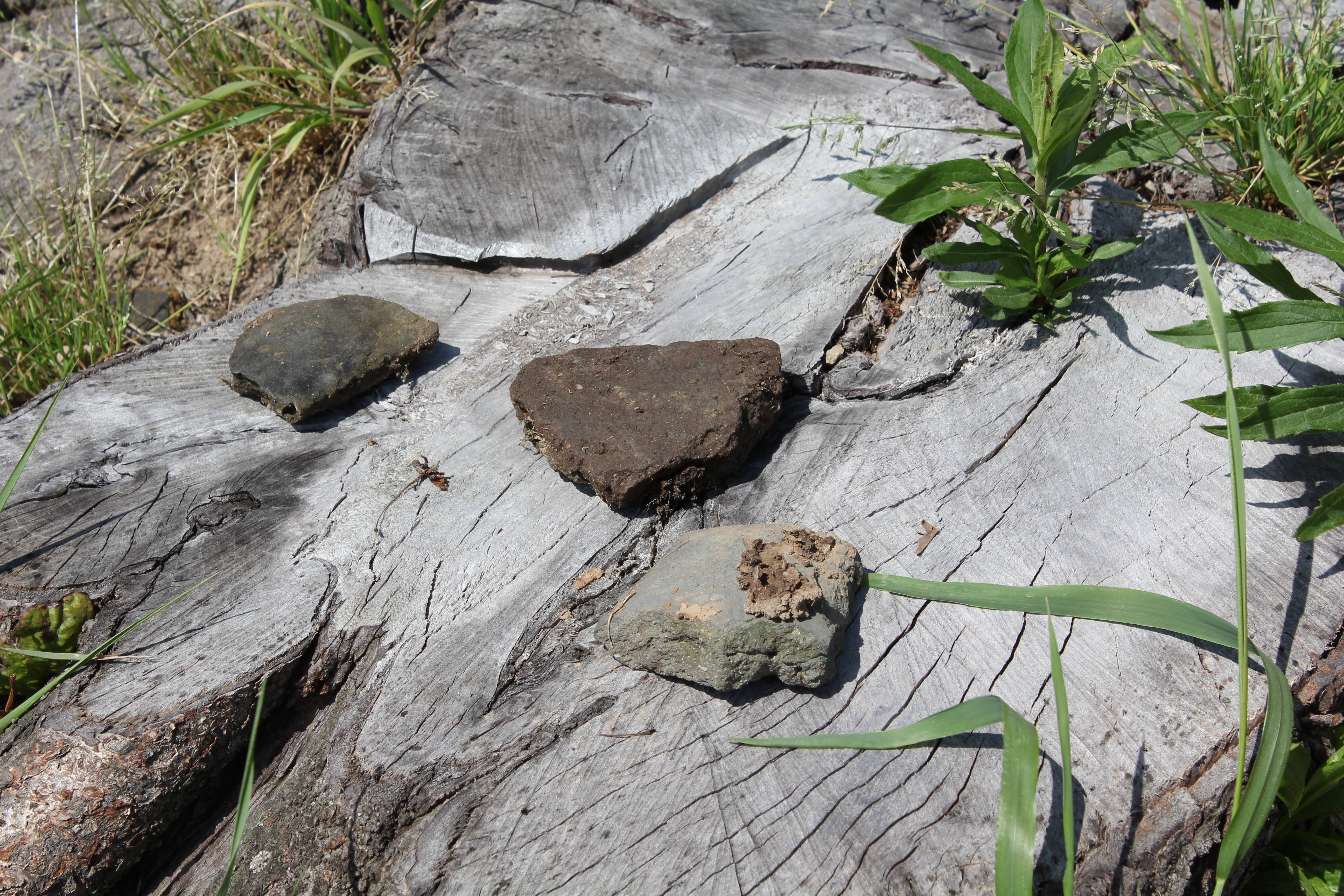 原城瓦片（長崎県南島原市） Canon EOS Kiss X4